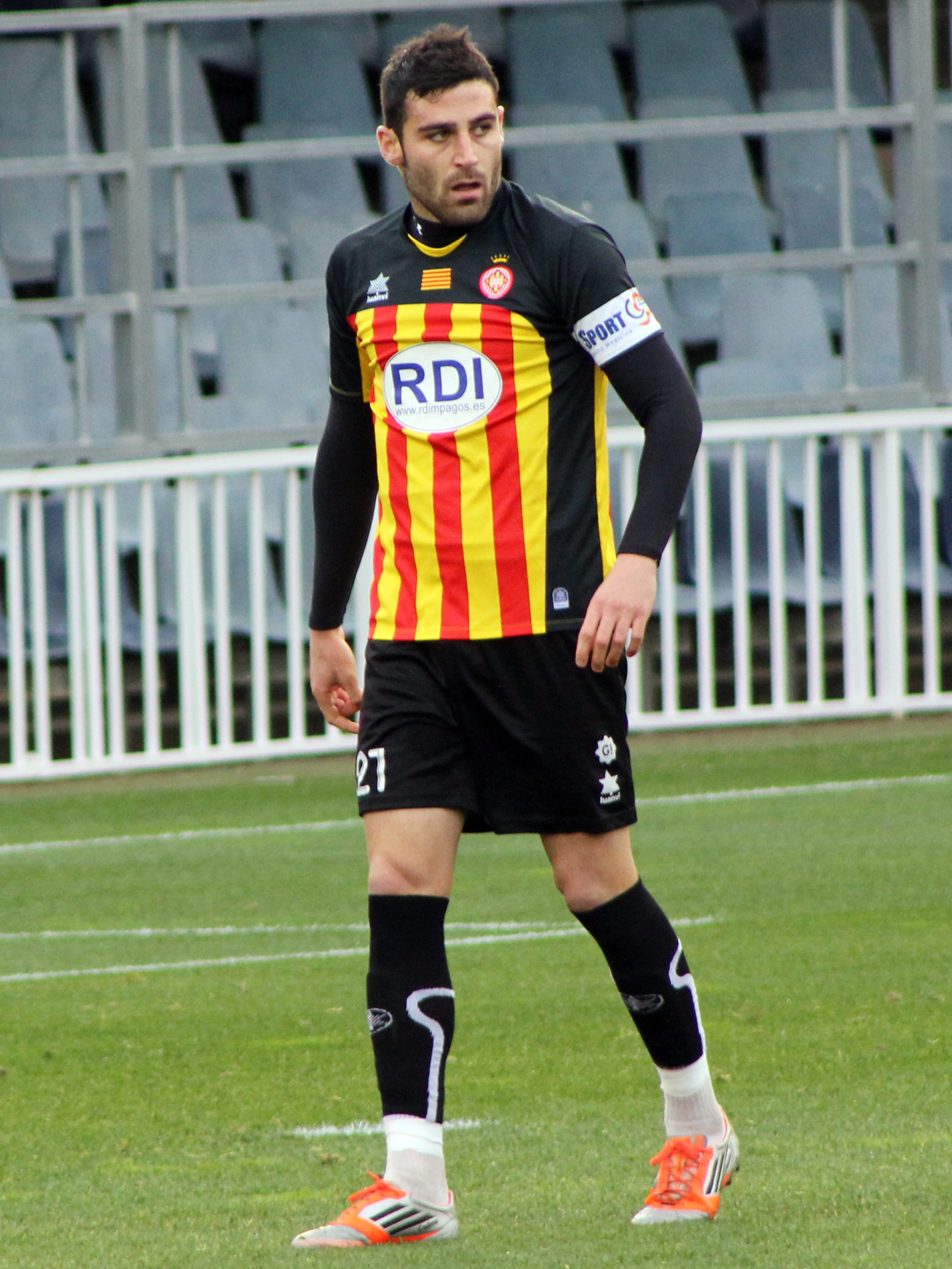 Foto realizada por Javier Segura (@castroquini en Twitter)